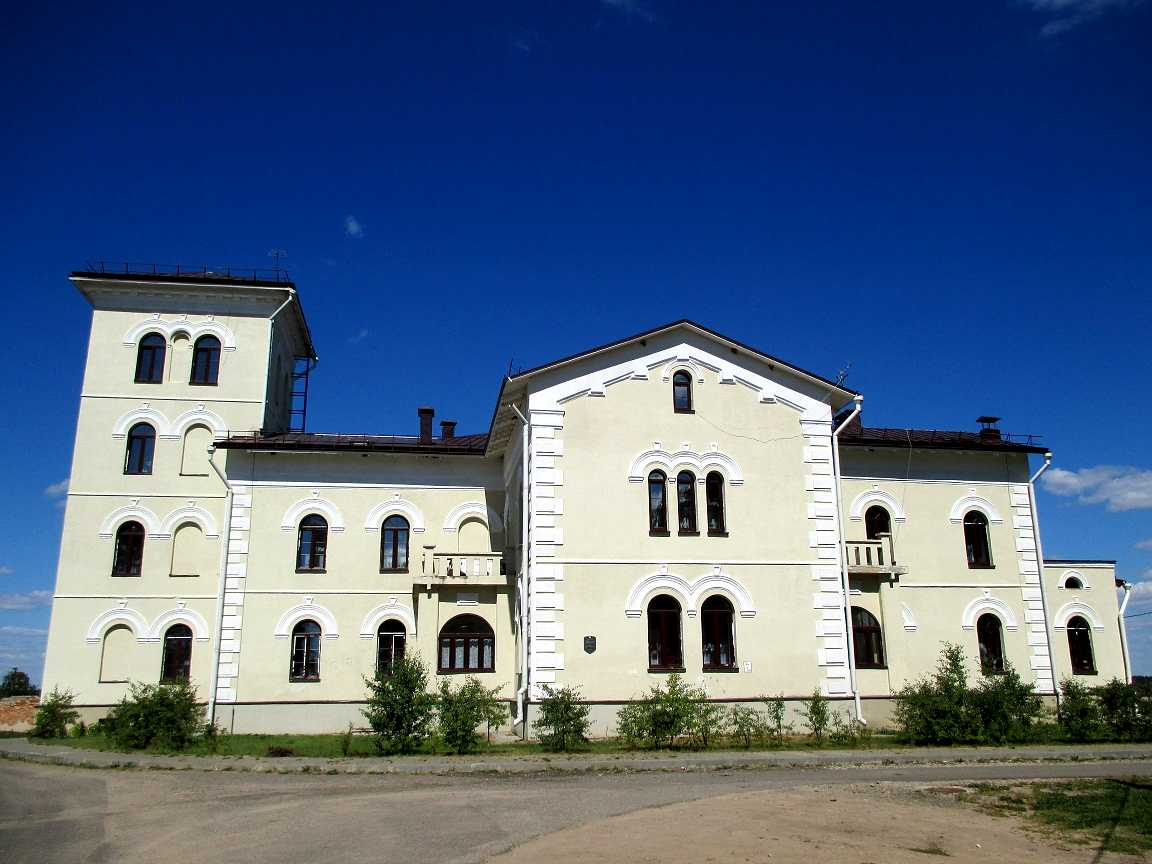 Тарнова - сядзібны дом. Лідскі раён. Беларусь